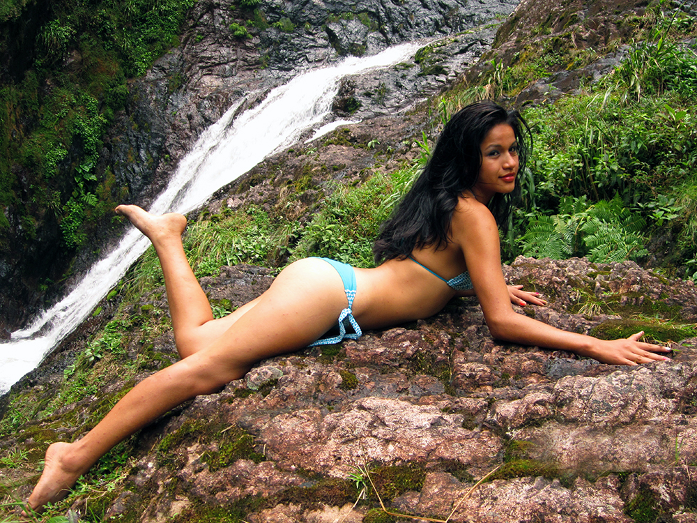 SEÑORITA UCHIZA EN VELO DE PLATA